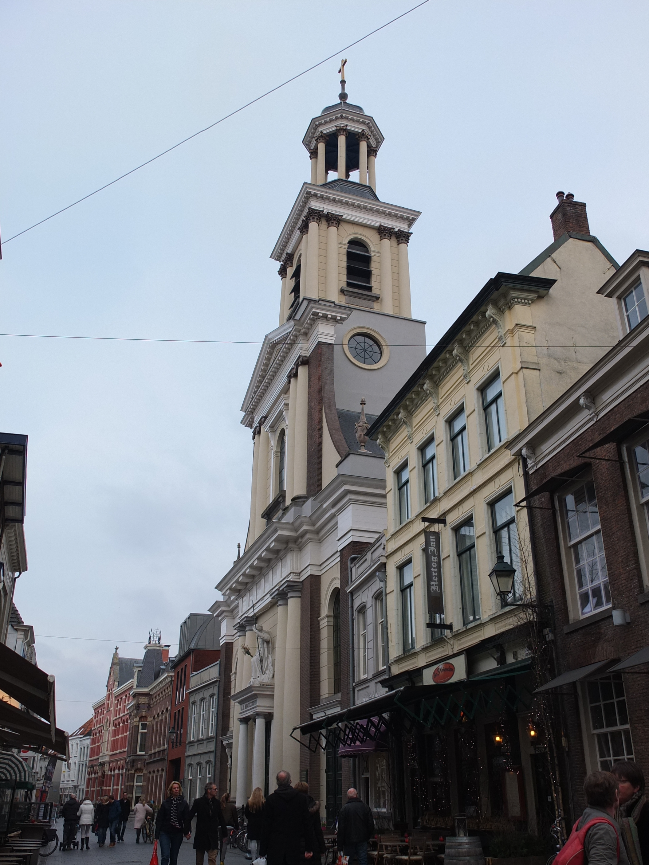 Sint-Antoniuskathedraal, Breda